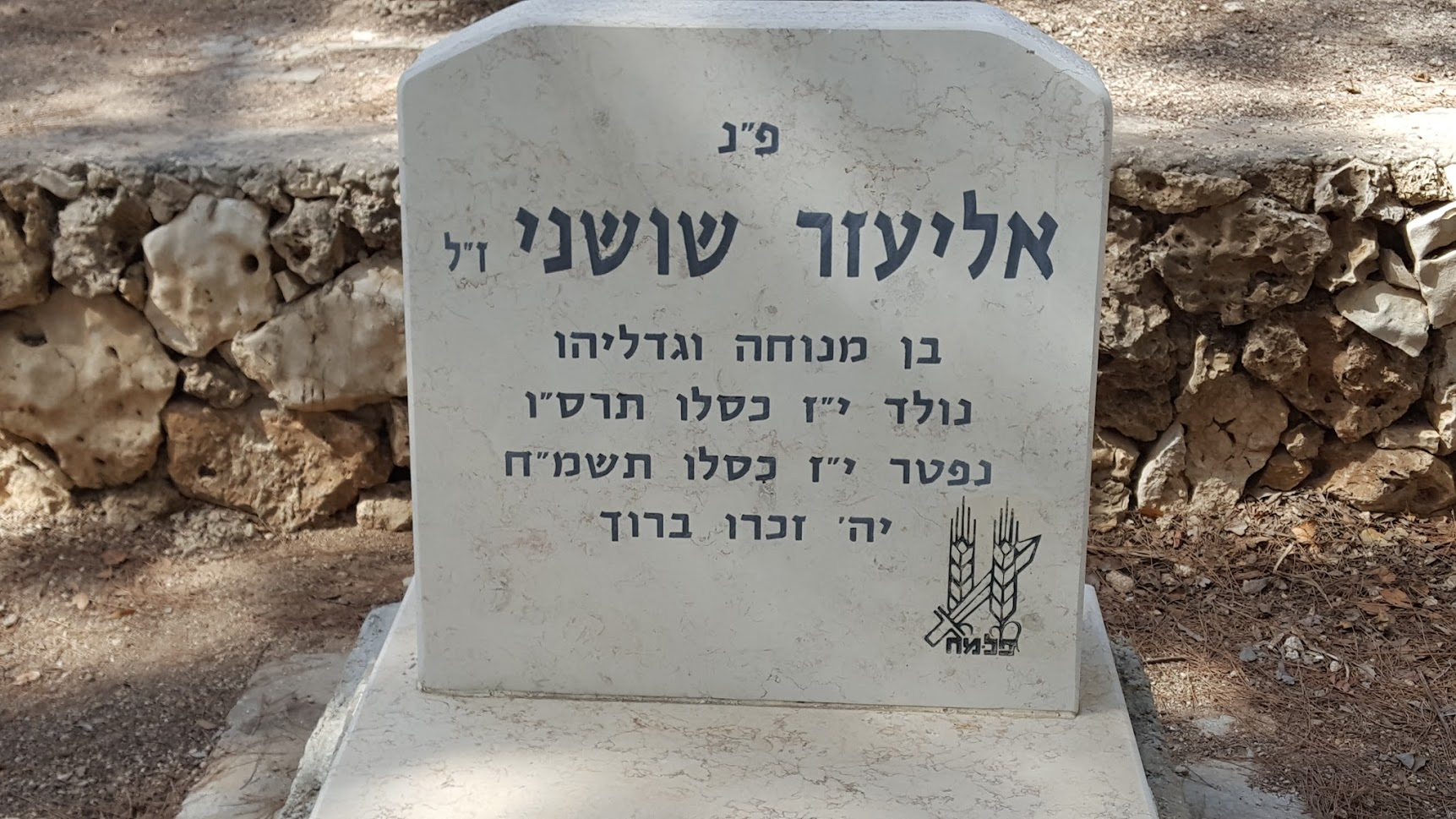 קברו של אליעזר שושני בבית העלמין של קיבוץ גבת צילום:אלי אלון